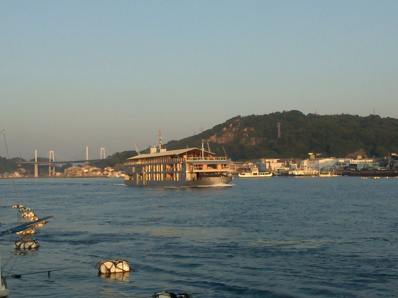 船の画です